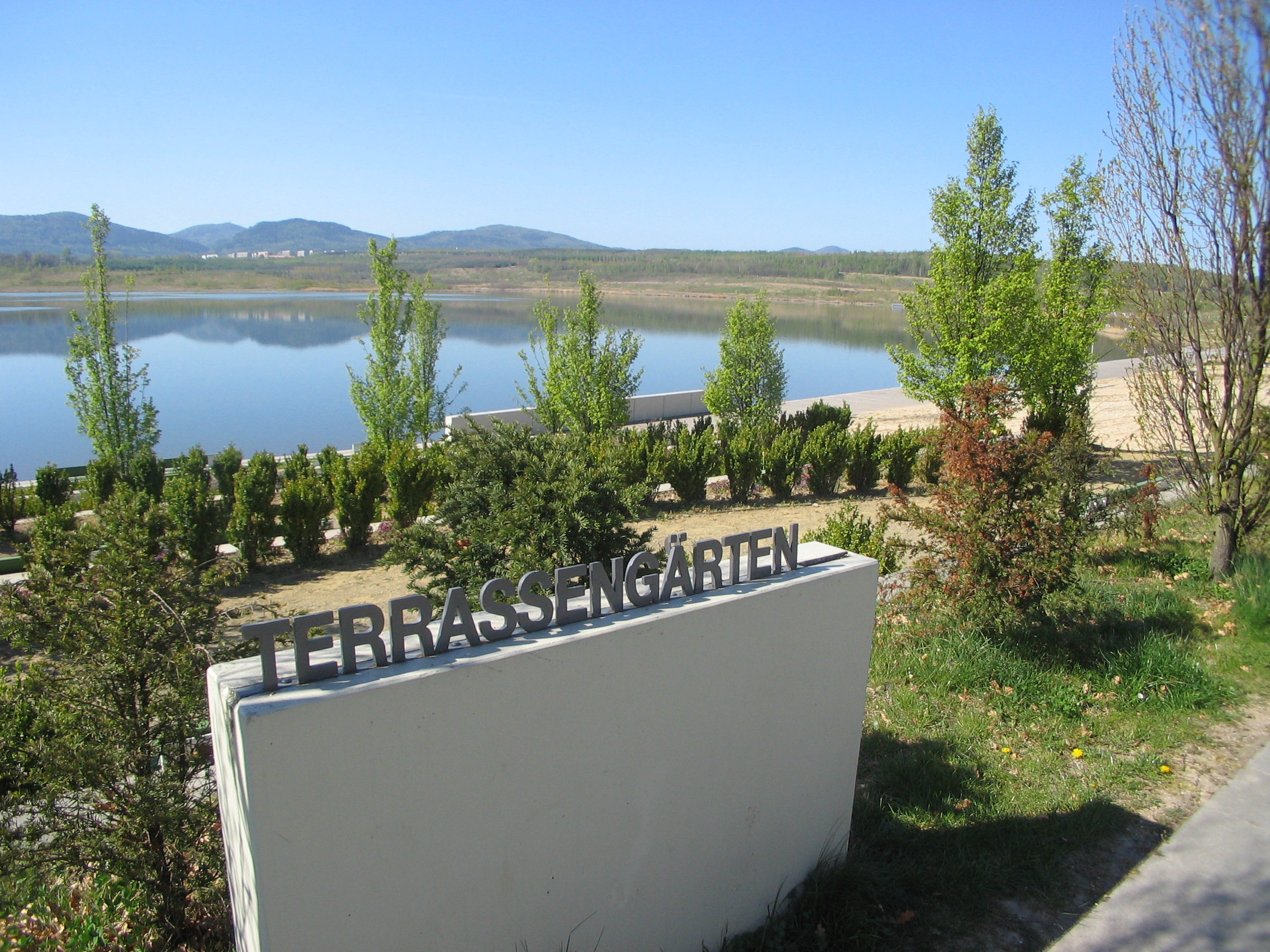 Terrassengarten am Olbersdorfer See